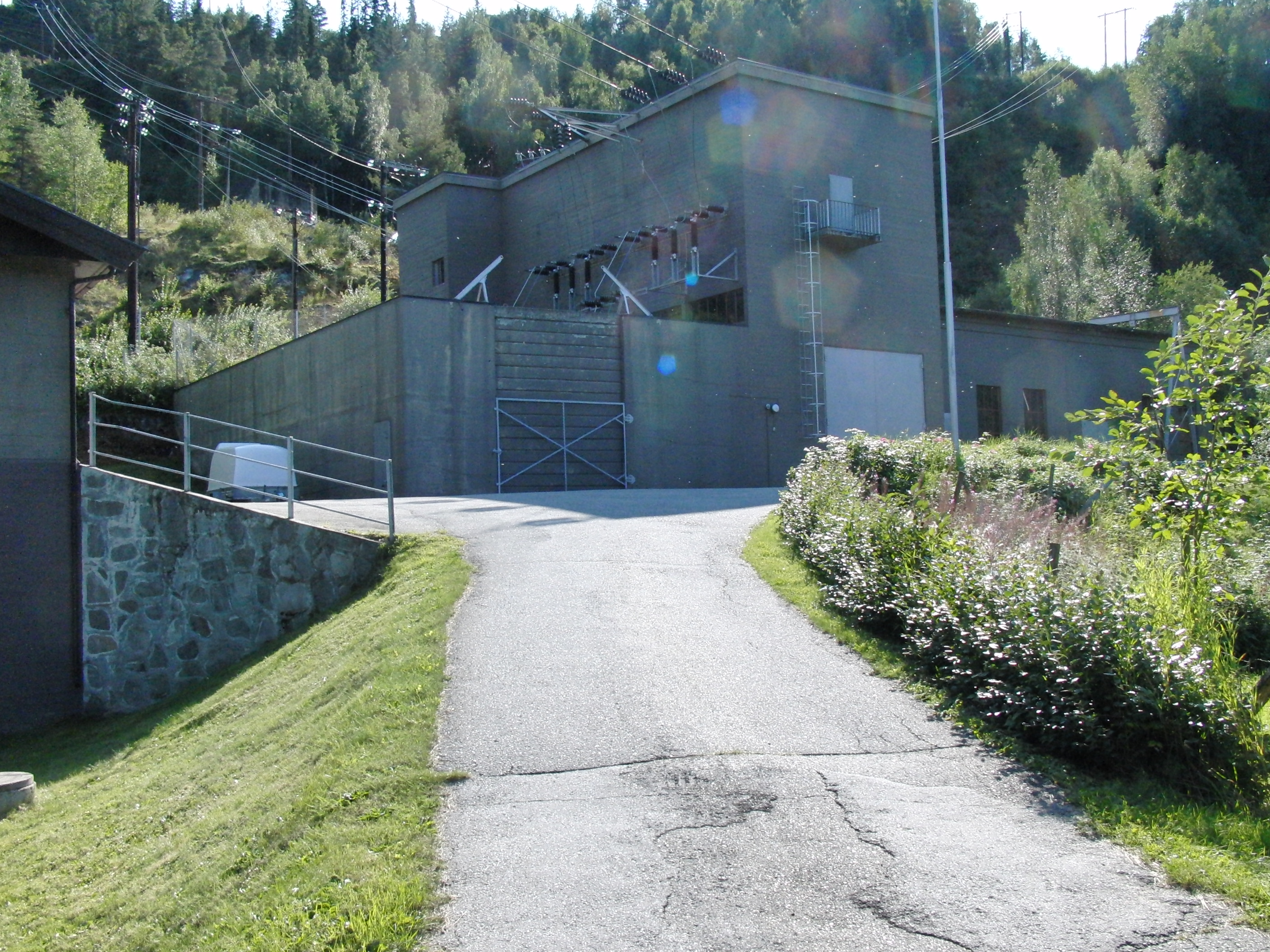 Nedre Tessa kraftverk